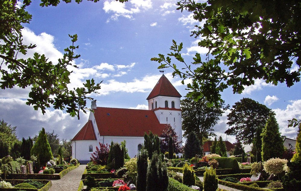 fra nord